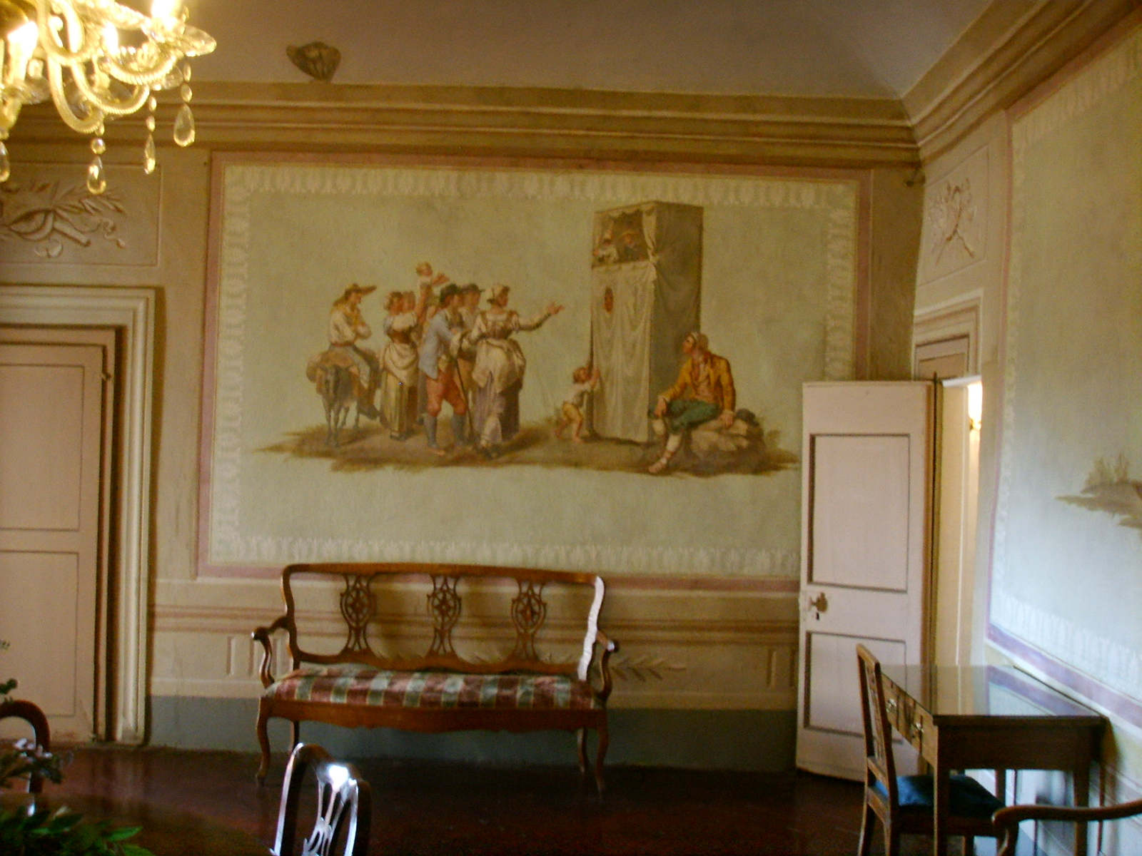 Villa villoresi di sesto, affreschi di Bartolomeo Pinelli